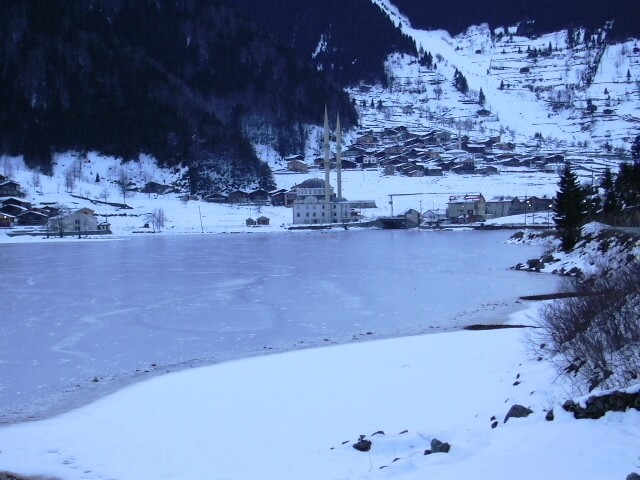 Uzungöl, Çaykara'nın kış aylarındaki görünümü.